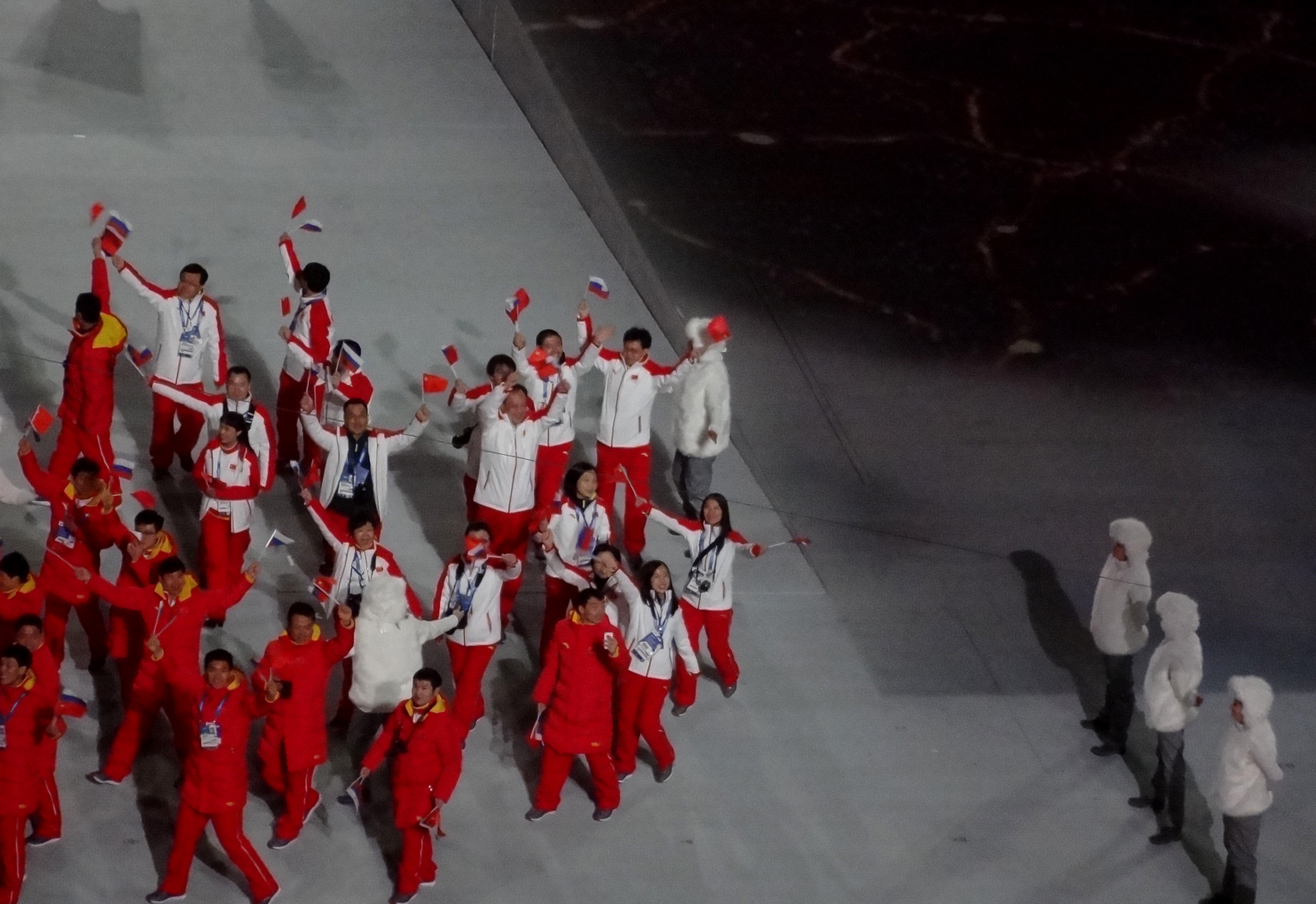 Церемония открытия Олимпийских игр в Сочи, 7 февраля 2014 года. Сборная Китайской Народной Республики.